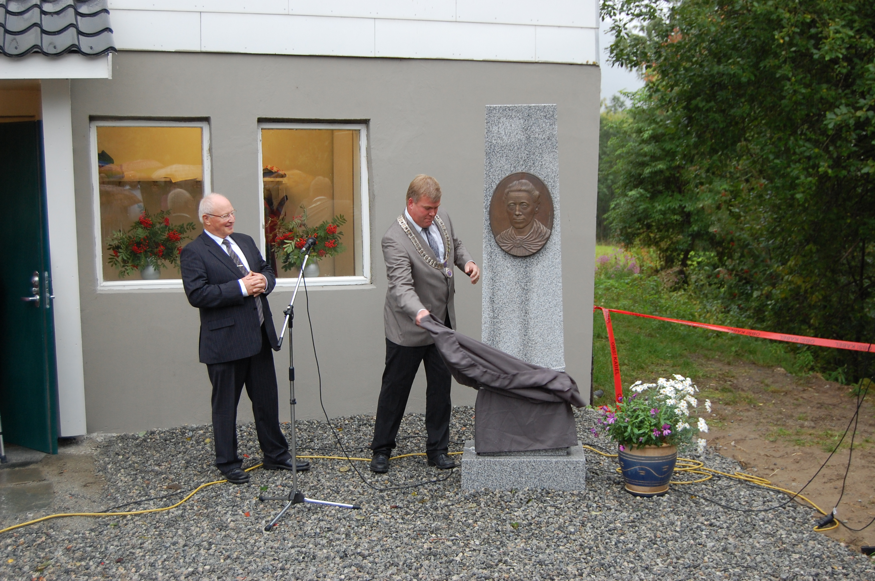 Avduking av minnestein på Hafslo, Luster